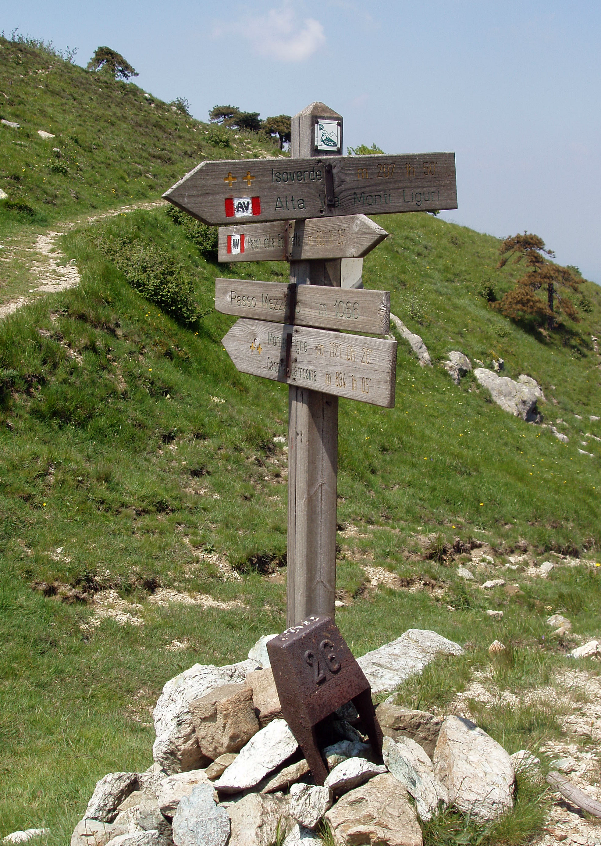 Il Passo Mezzano: palina segnaletica